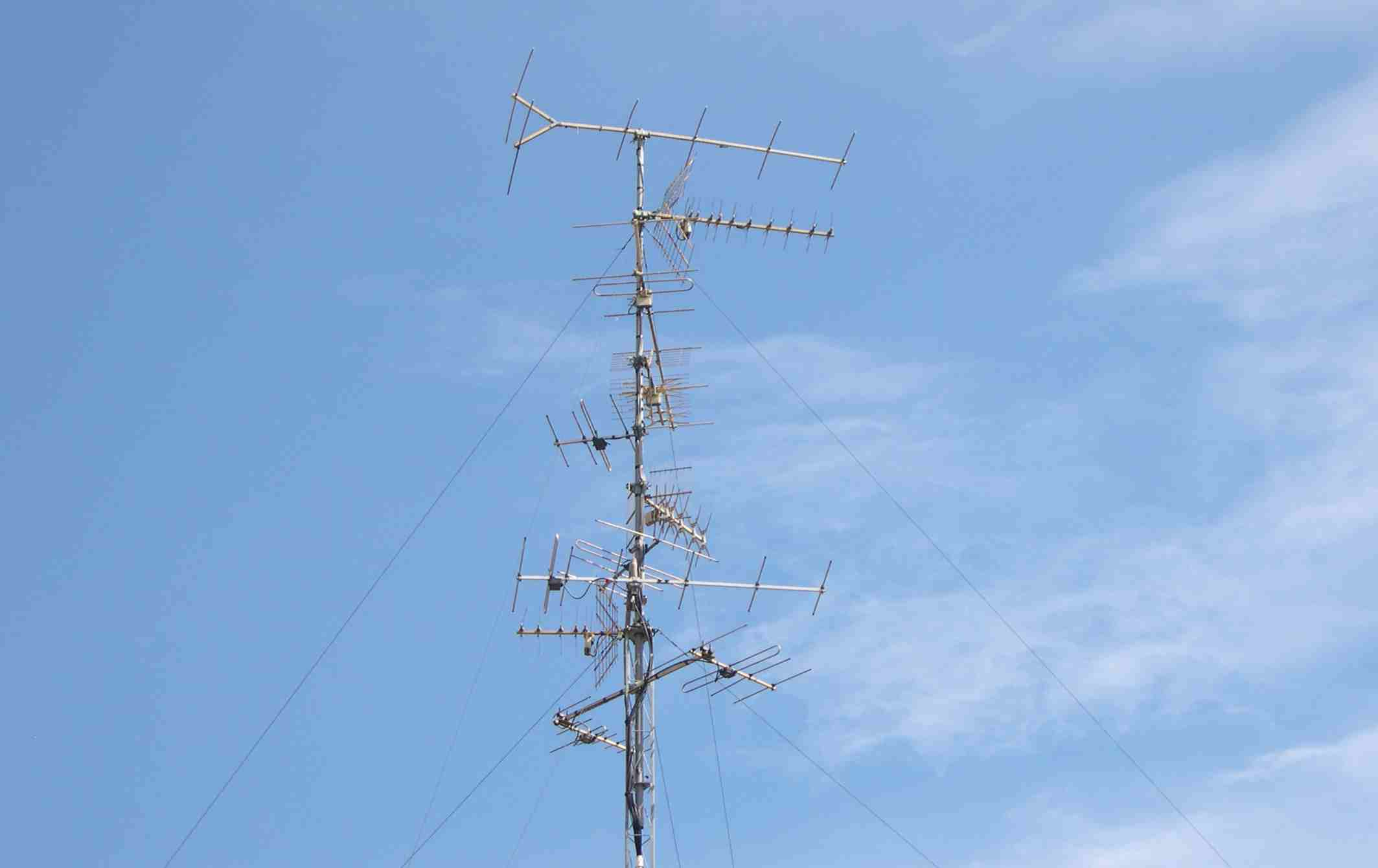 Vue d'une antenne de réception télévision VHF-UHF, terrestre, en zone frontalière, Mulhouse, permettant de capter les chaînes françaises, allemandes et suisses. Toutes les antennes sont en polarisation horizontale sauf celle destinée au réseau 5 et 6. Les antennes francaises sont dirigées vers l'émetteur de Mulhouse-Bevédère, les antennes suisses vers émetteur TV Bâle Skt Chischona, Les Ordons ou le Chasseral, les antennes allemandes vers le Kaiserstuhl-Totenkopf (33-58) et le Feldberg ou alternative, Hornisgrinde (canal E9). Photo de S.Nueffer. Reproduction libre.